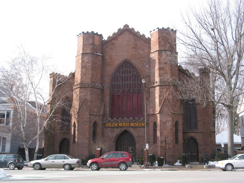 Das Hexenmuseum in Salem (MA). (Bild: Neckhair)